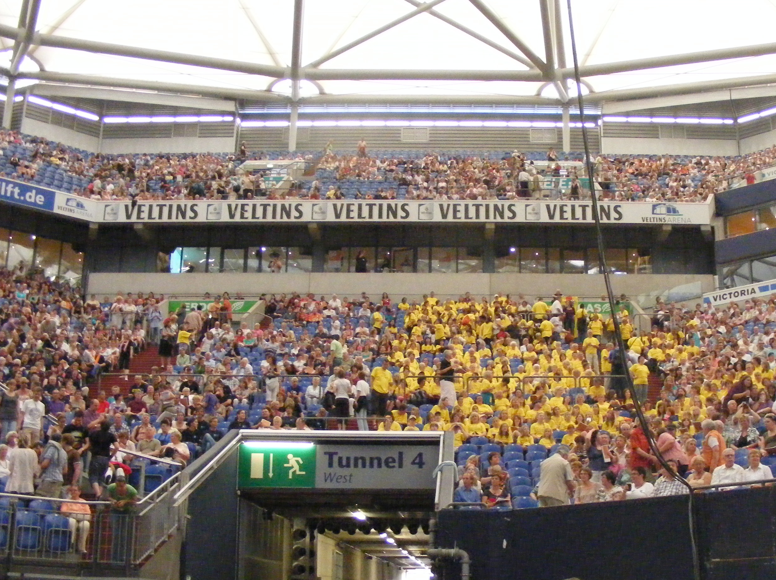 !SING – DAY OF SONG Beim Abschlusskonzert in der VELTINSArena auf Schalke singt der größte mehrstimmige Chor deutscher Musikgeschichte